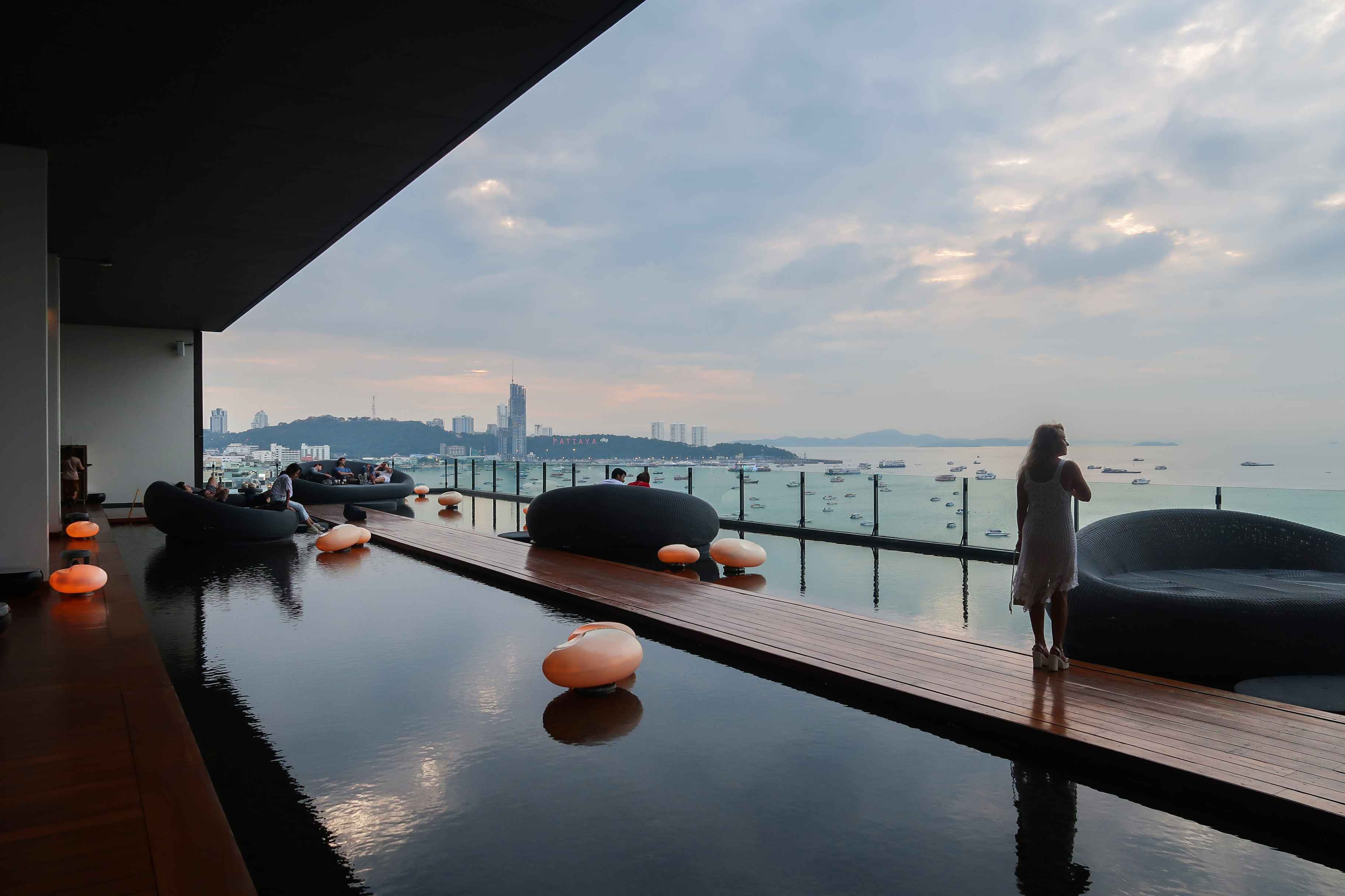 Hilton Pattaya pool